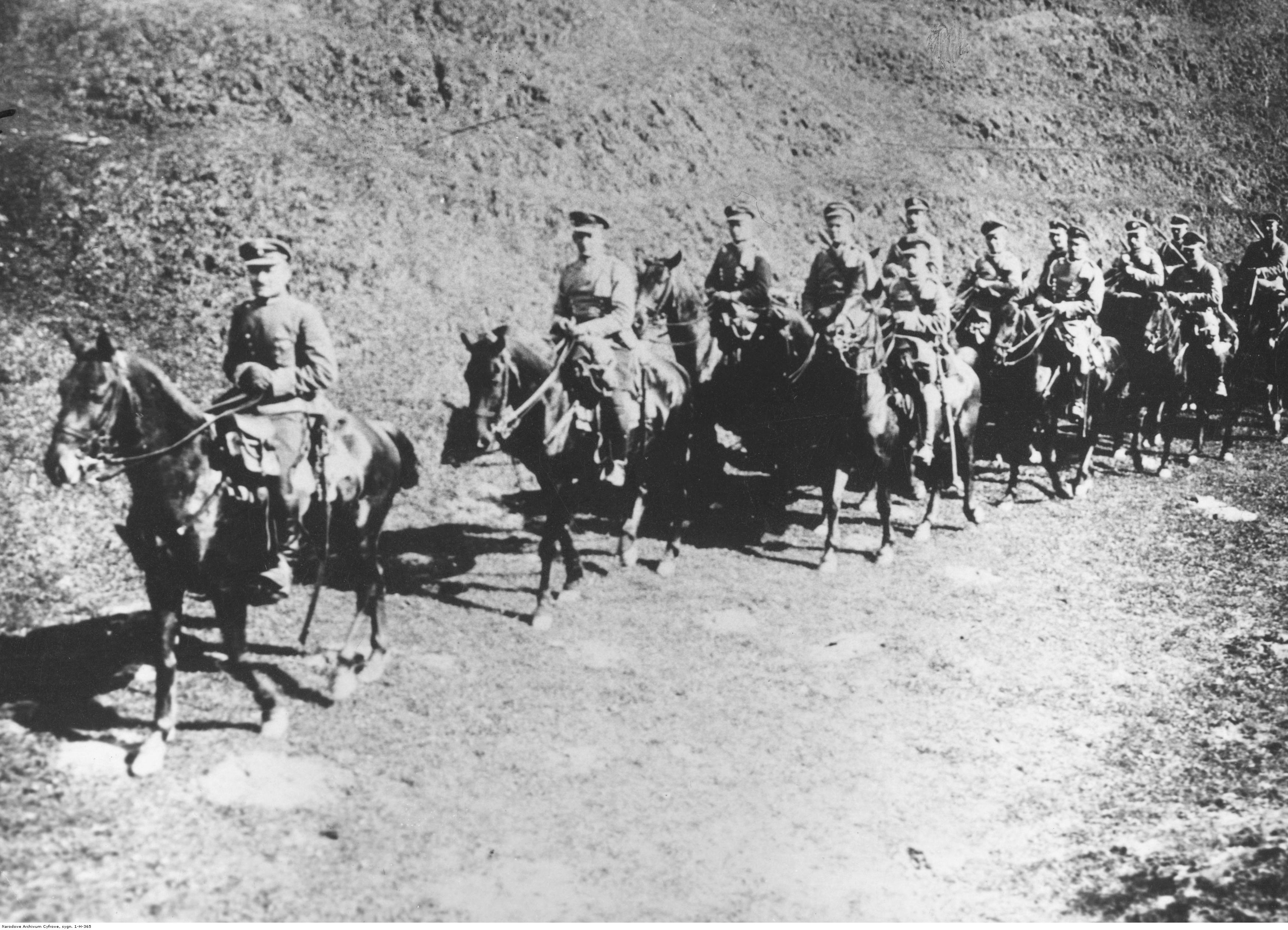 Walki polsko-ukraińskie - oddział kawalerii w marszu. Koncern Ilustrowany Kurier Codzienny - Archiwum Ilustracji. Sygnatura: 1-H-365